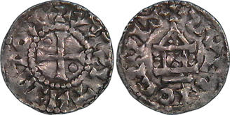 Diamètre : 21 mm Métal : Argent Poids observé : 1,45 g. AVERS Légende : + ROTBERTVS RT, (légende rétrograde). Traduction : (Robert, roi). Description : Croix cantonnée aux 1 et 4 d'un besant. REVERS Légende : + SVESIO CIVIT. Traduction : (Cité de Soissons). Description : Temple sommé d'une croisette coupant la légende ; le fronton est orné de trois points et l'intérieur du temple est constitué d'une croisette.